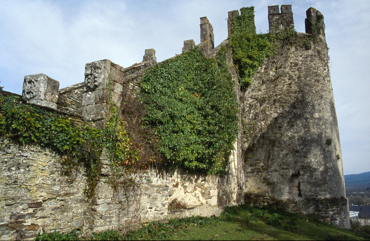 Castillo. Torre de Fortaleza de Sarria